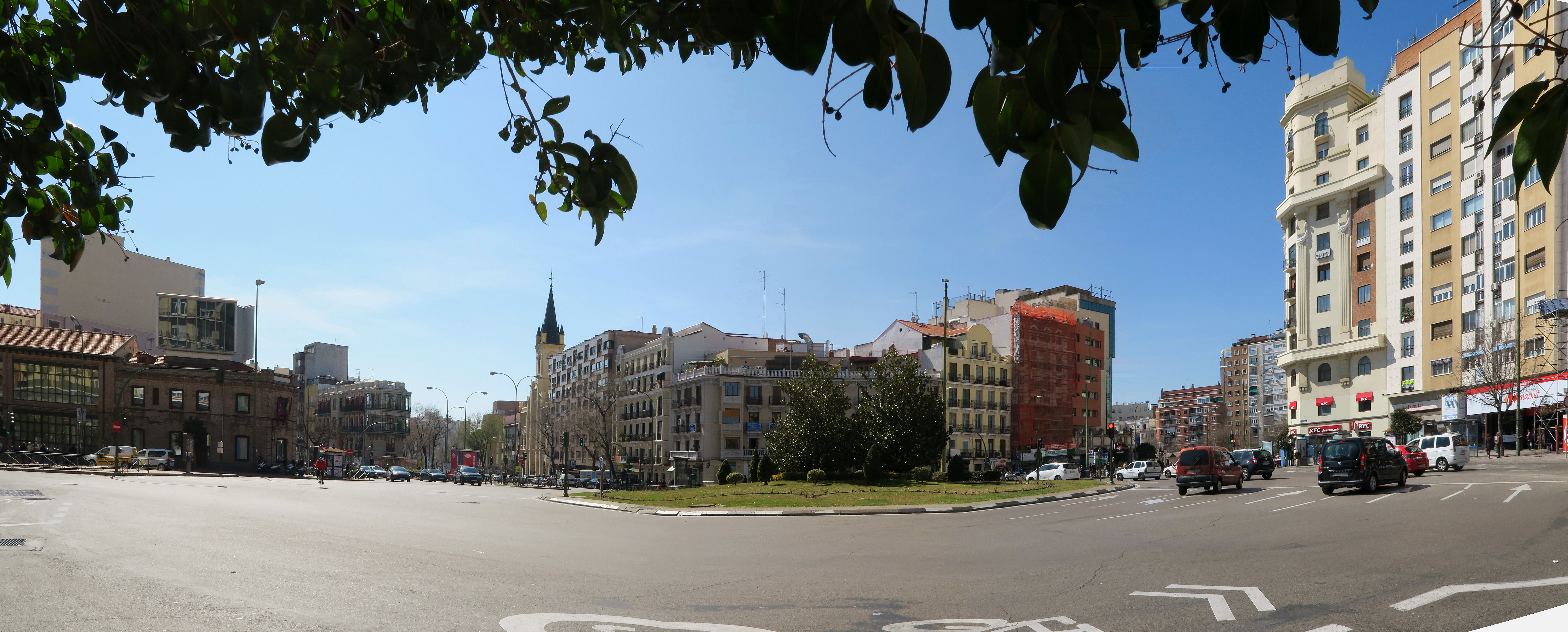 Glorieta de Cuatro Caminos, panorámica